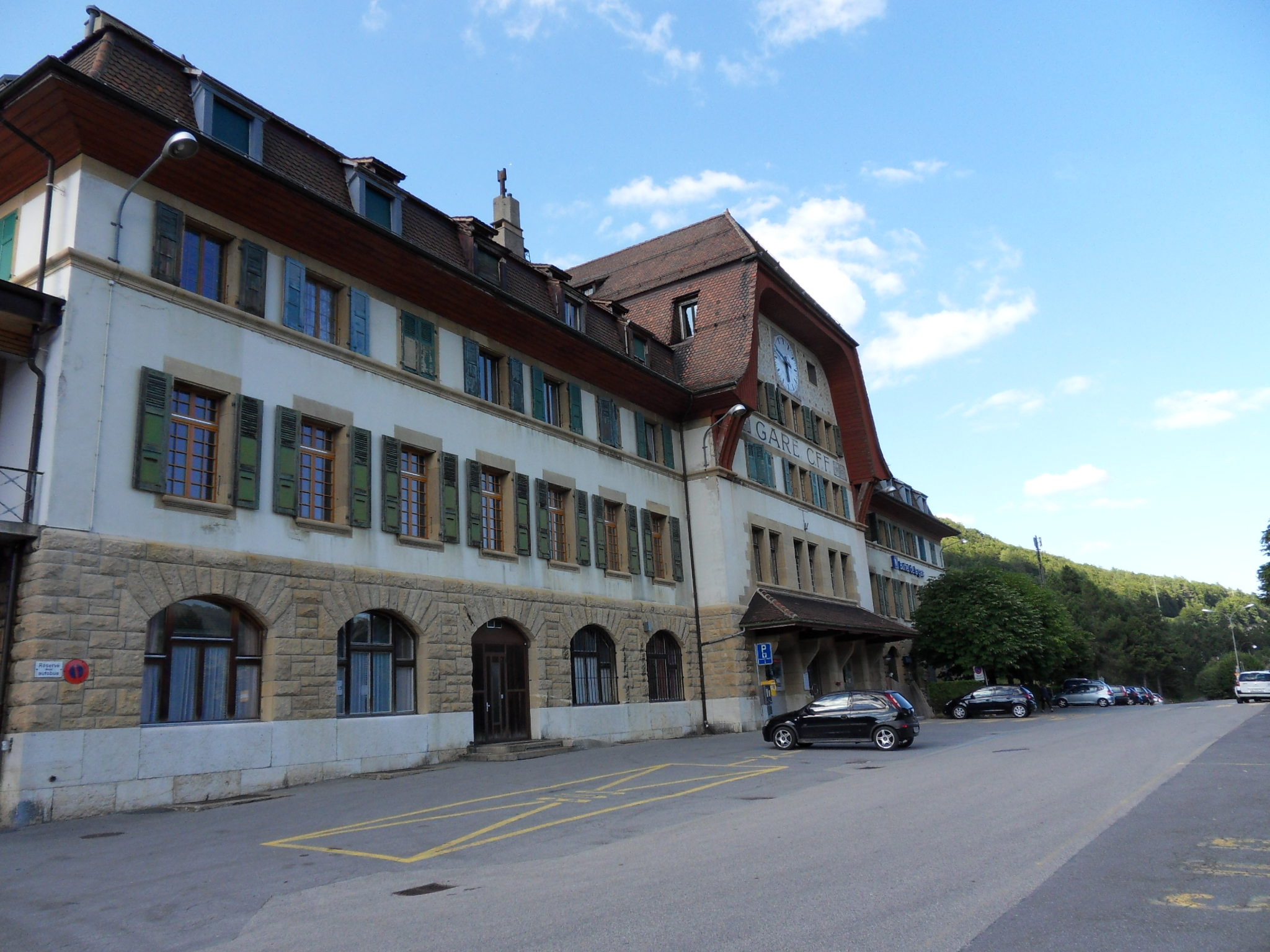 Gare de Vallorbe (Suisse). Ligne de Dole à Vallorbe. Ligne Dijon-Ville - Vallorbe (frontière) : Le bâtiment voyageurs